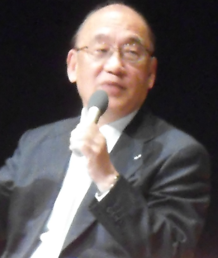 奈良県知事荒井正吾氏。2012年11月に東京の明治大学で開催された古事記編纂1300年シンポジウムで撮影。